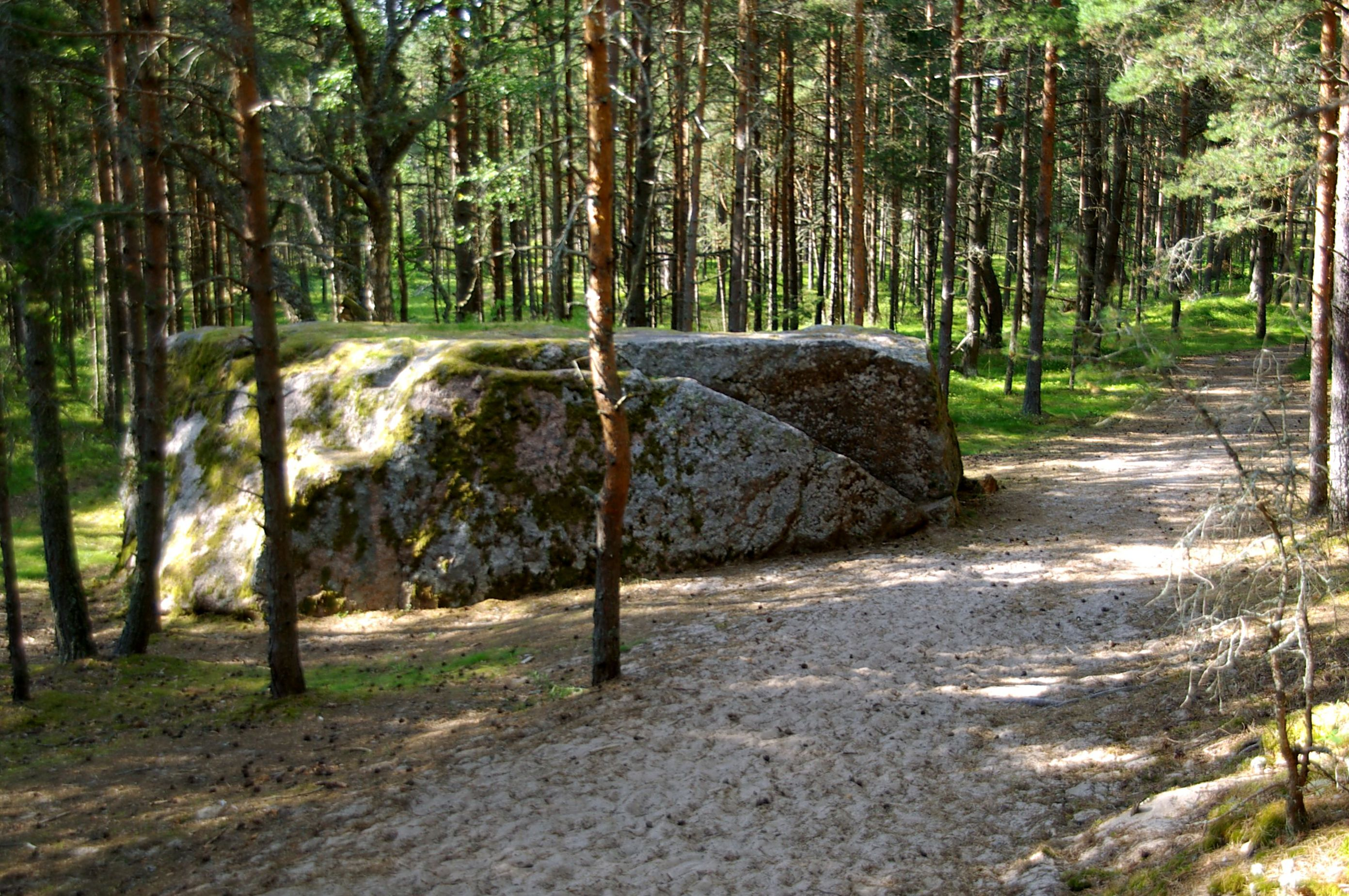 asub Harju maakonnas Jõelähtme vallas